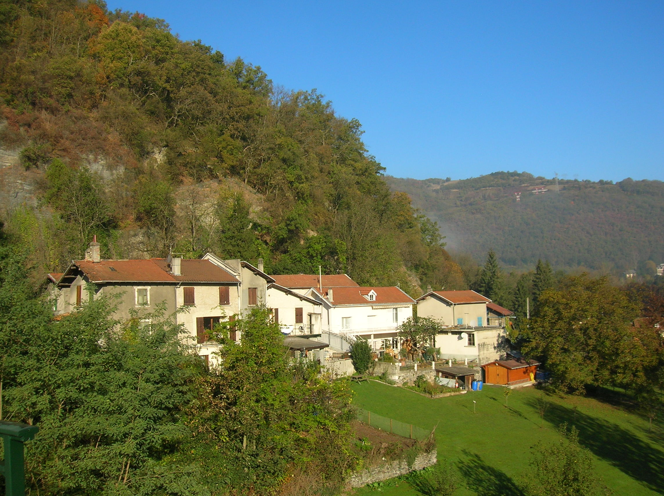 Notre-Dame-de-Mésage, Isère, France.